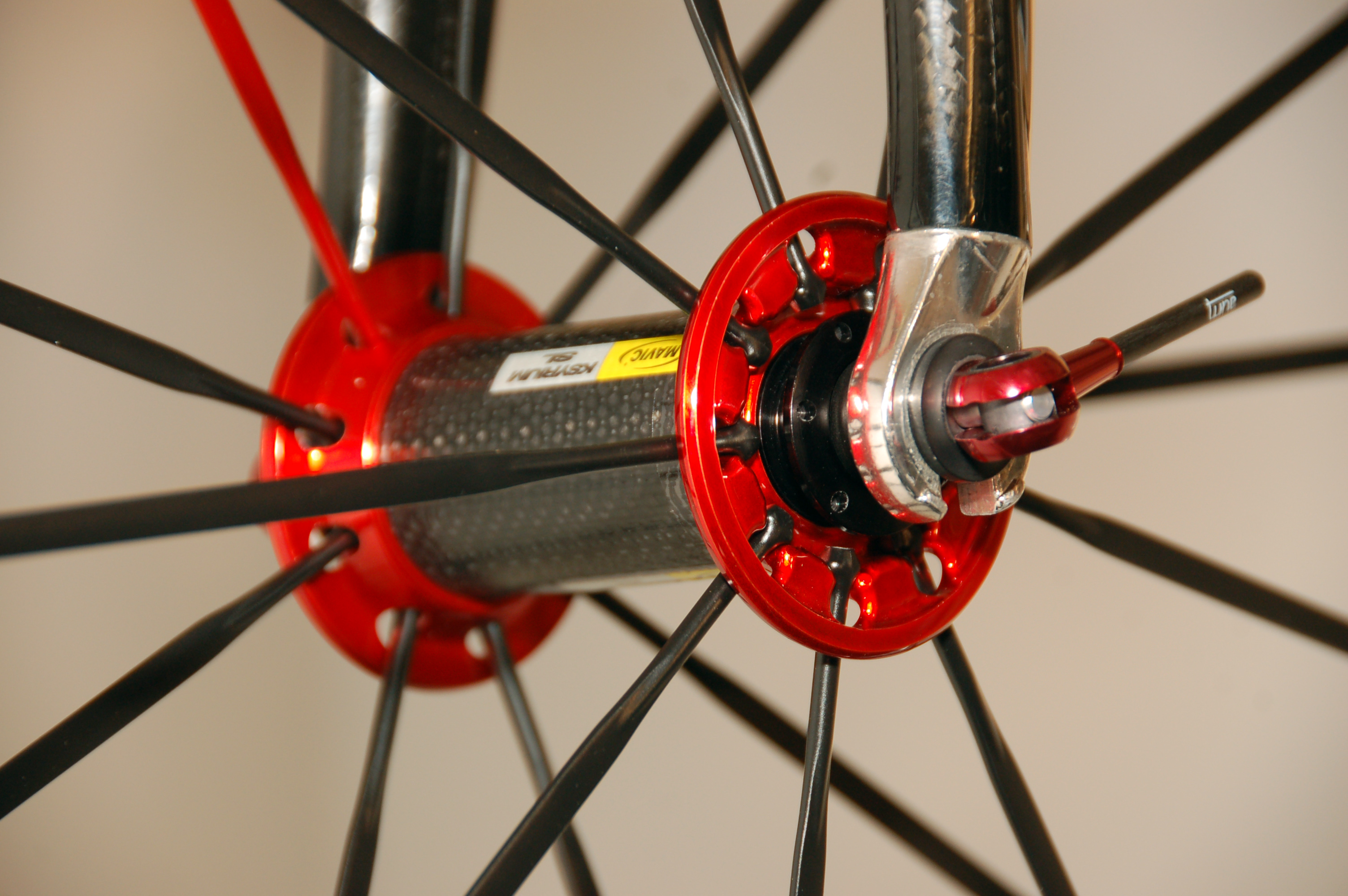 Detail Fahrradtechnik; mit freundlicher Genehmigung von - fahrradvermietung am Kurfürstendamm